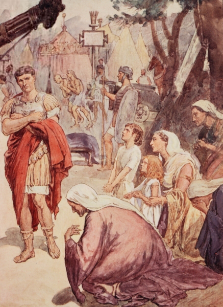 Coriolano e le matrone di Roma, illustrazione tratta da "Plutarch's Lives for Boys and Girls, raccontati da W.H. Weston, London 1910", litografia a colori.